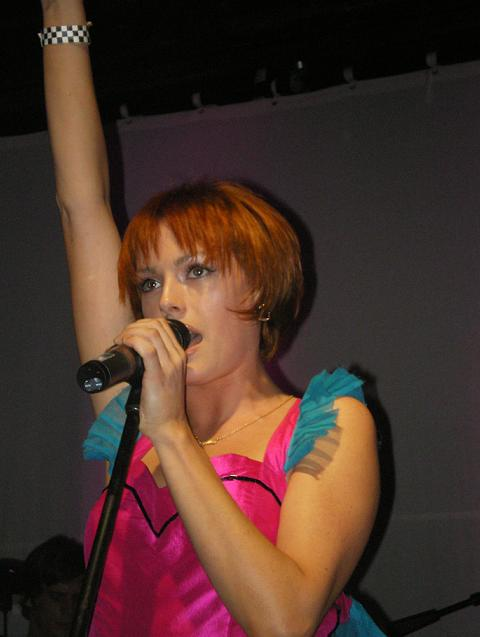 Gwenno Saunders